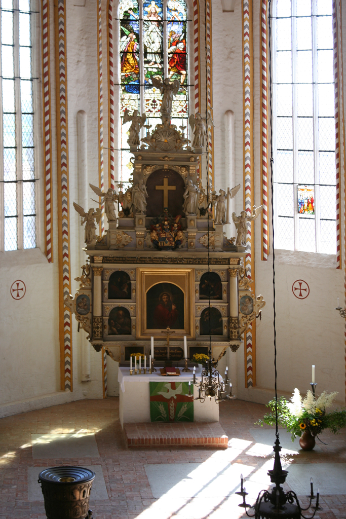 Altar der St.-Laurentius-Kirche in Schönberg, Mecklenburg-Vorpommern, Deutschland